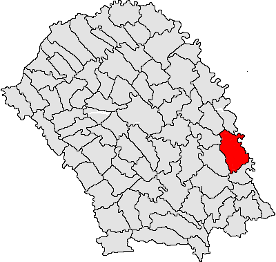 Categorie:Hărţi ale judeţului Botoşani